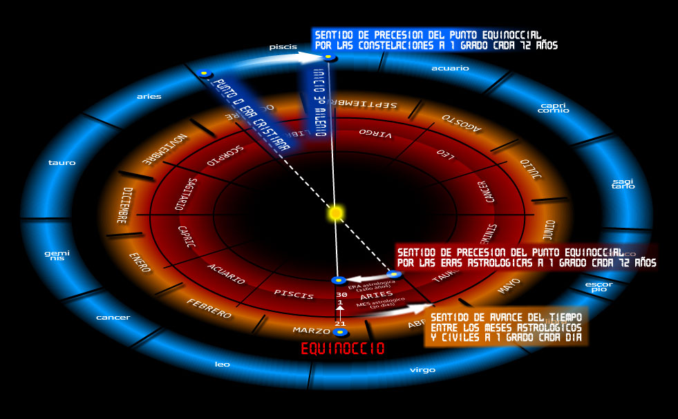 Sentido de precesión del punto equinoccial vernal entre las eras astrológicas y las constelaciones eclípticas durante la era cristiana.